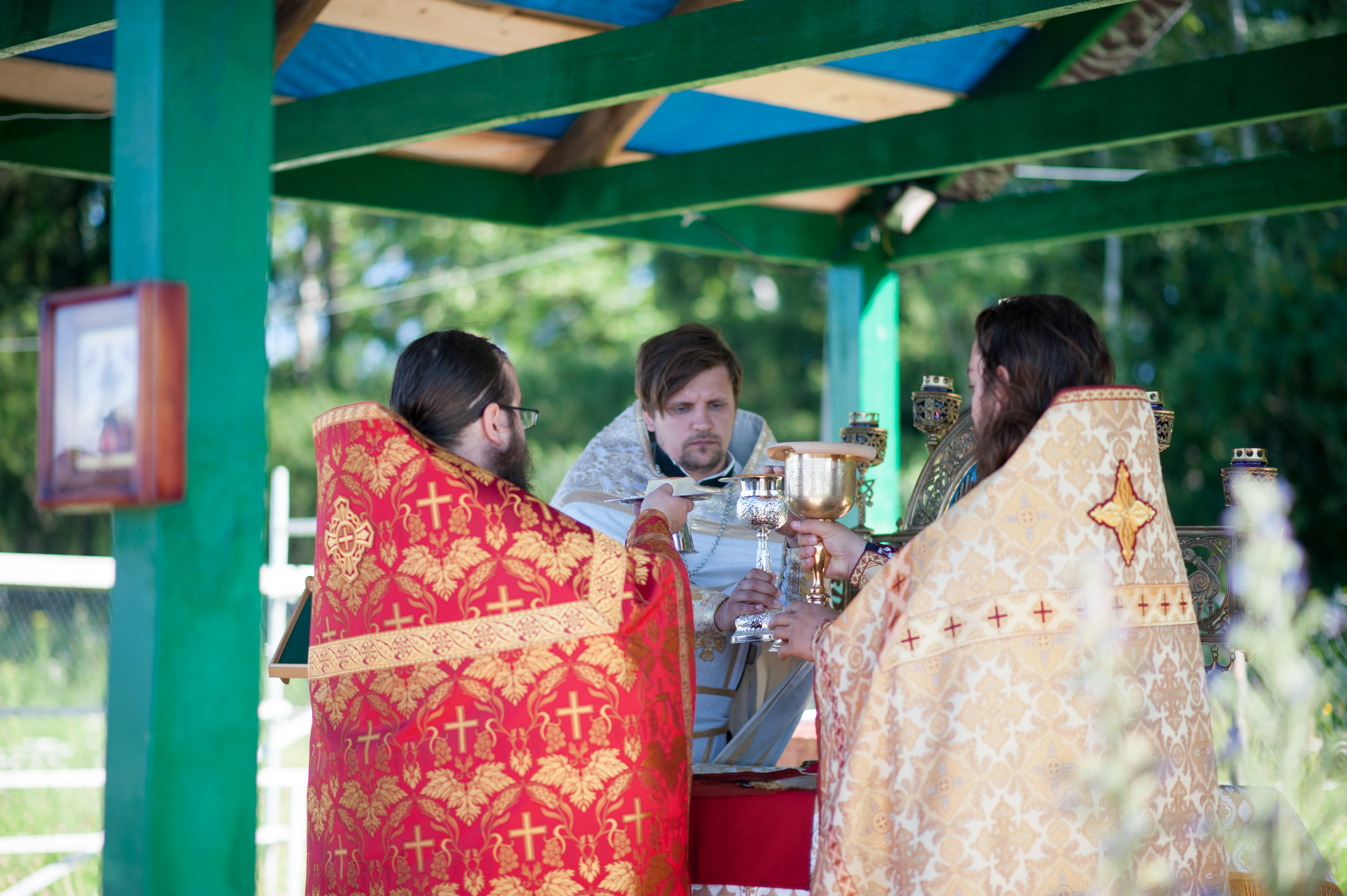 Фестиваль "Братья", 2017 год